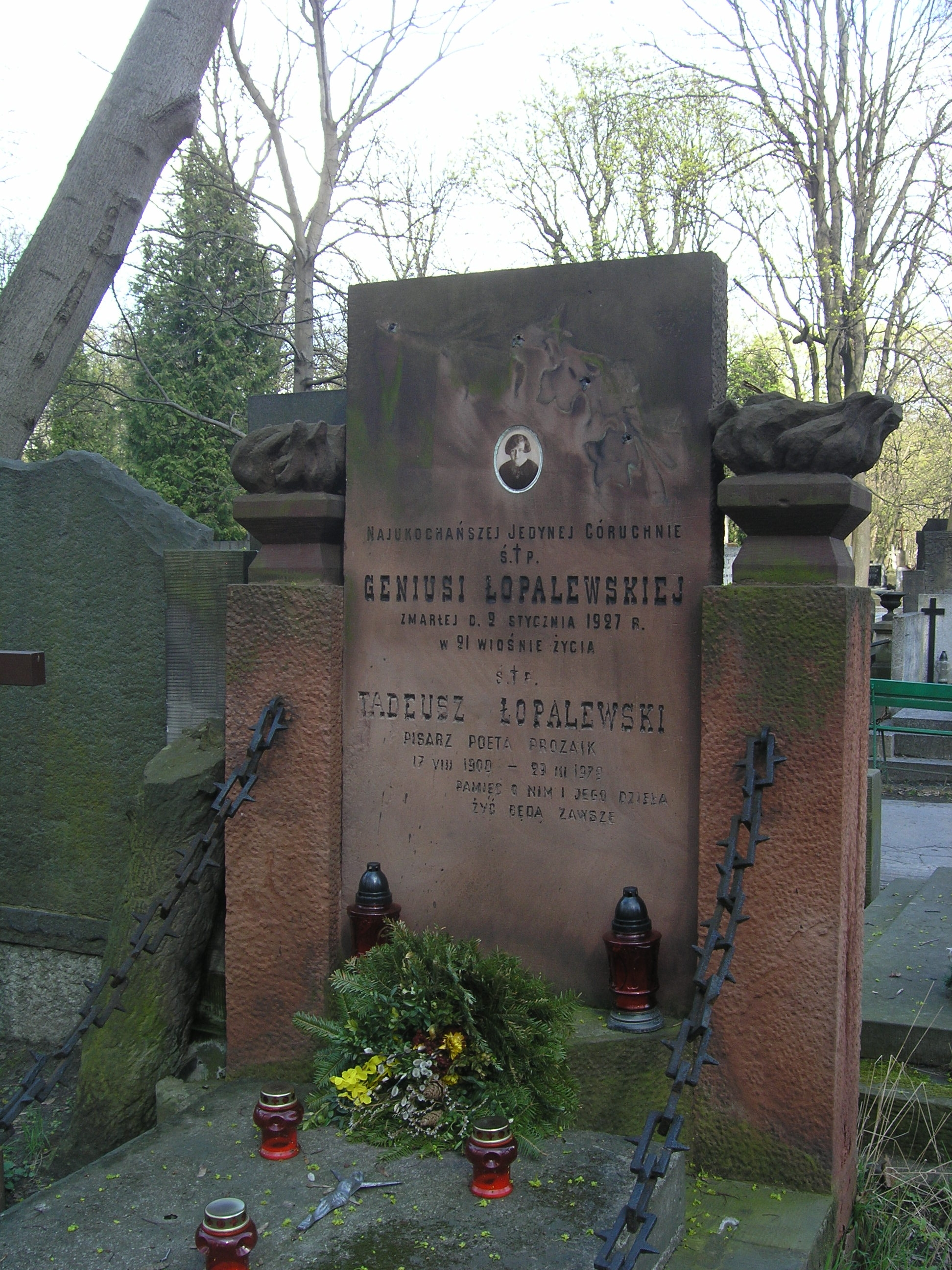 Grób poety i prozaika Tadeusza Łopalewskiego na Starych Powązkach w Warszawie (stan na kwiecień 2012)